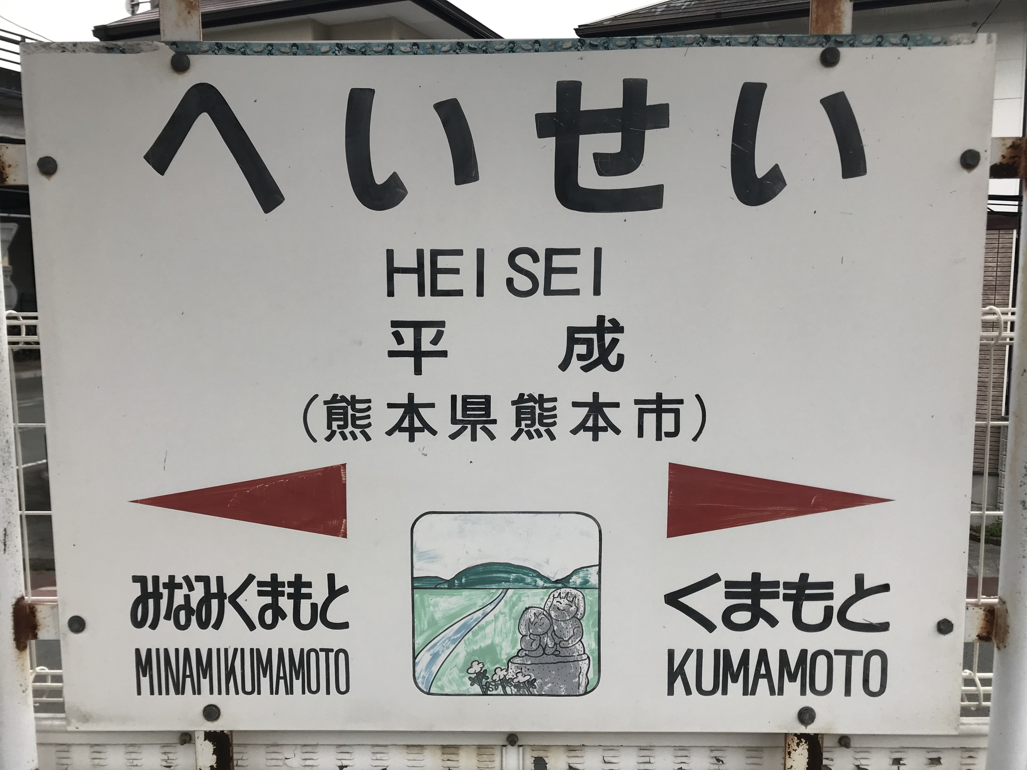 平成駅の駅名標。イラストは日向往還の起点にある地蔵